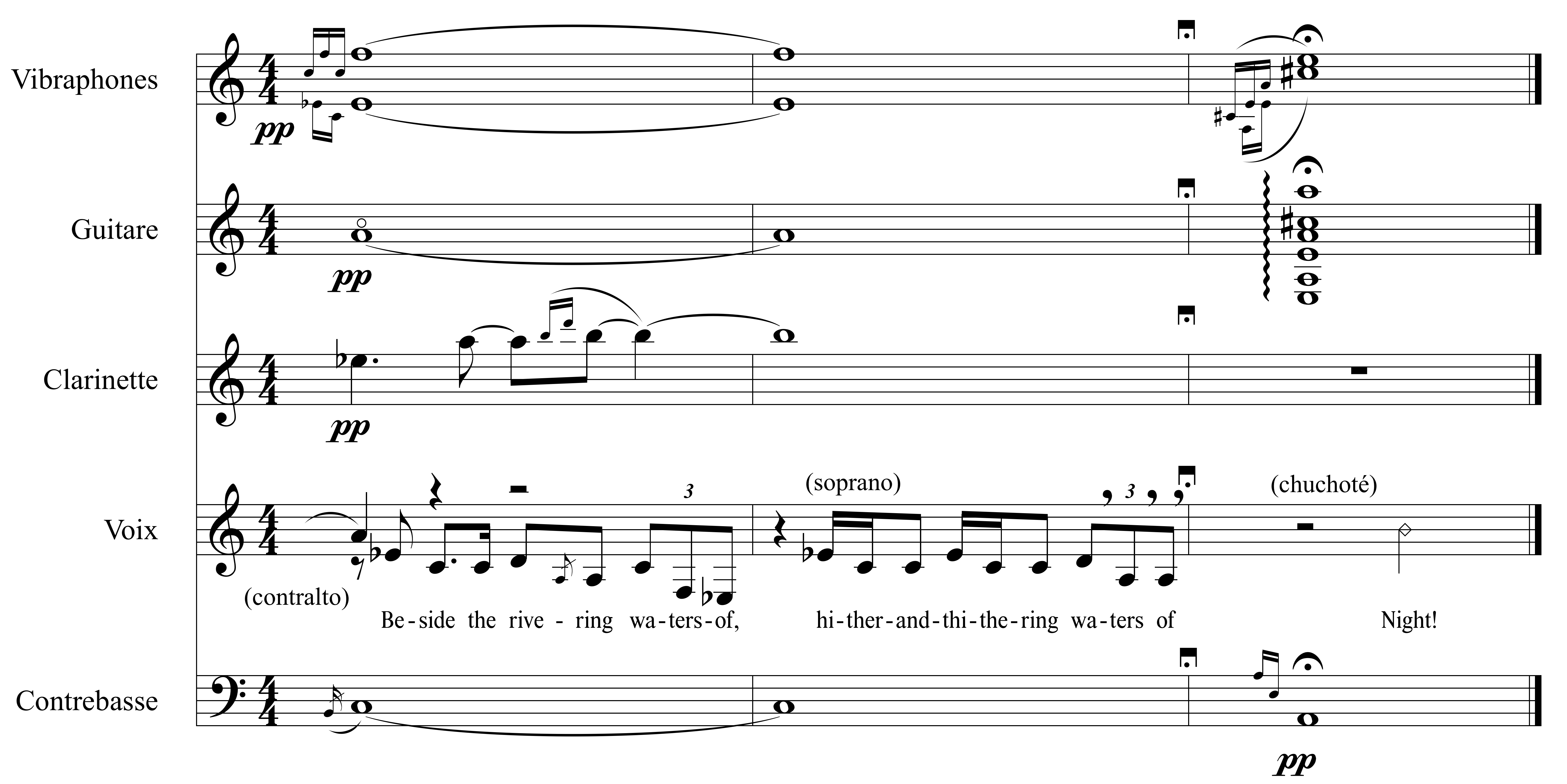 Extrait de la pièce XXVI d'Anna Livia Plurabelle d'André Hodeir